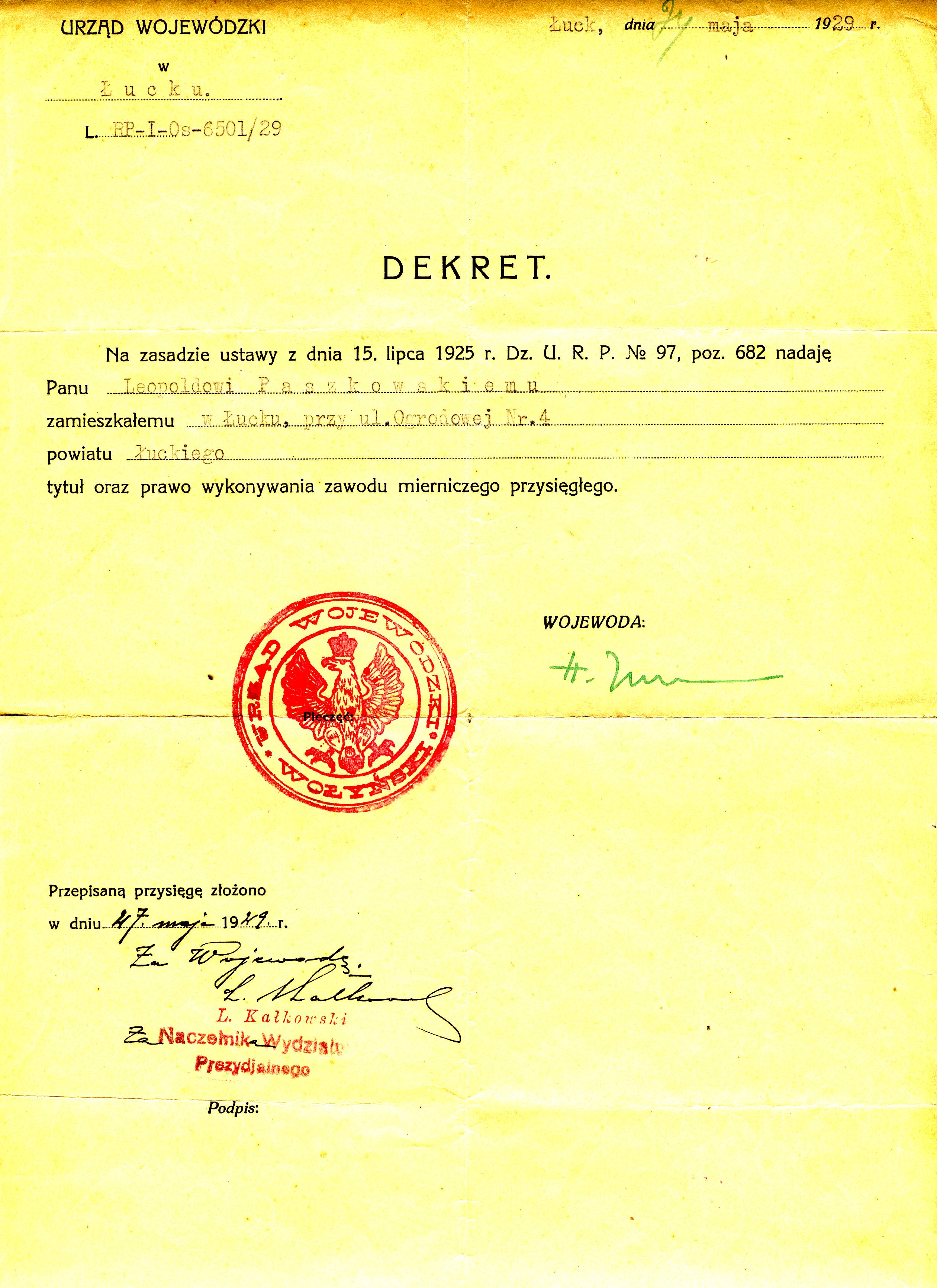 Dekret Wojewody nadający tytuł mierniczego przysięgłego Zenon Paszkowski, Polacy z Kresów Wschodnich na Warmii i Mazurach - Leopold Kleofas Paszkowski